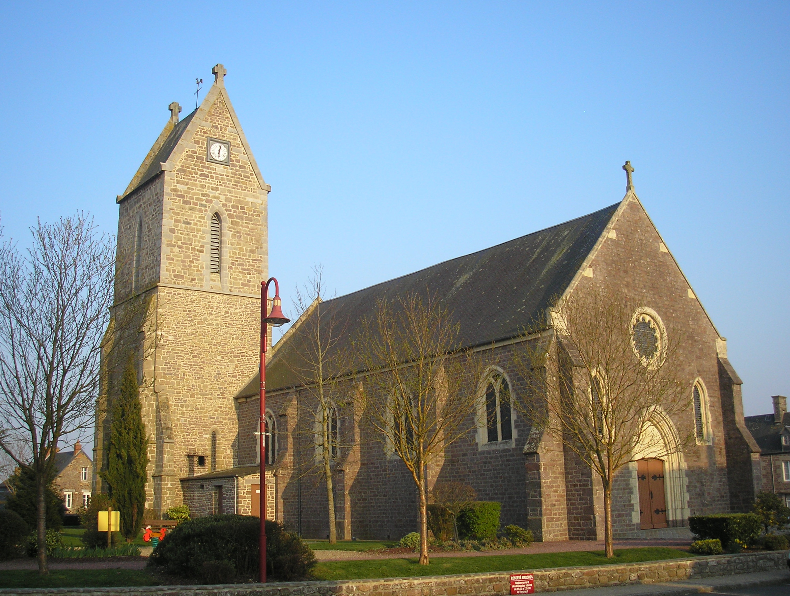 Moyon (Normandie, France). L'église Saint-Germain.